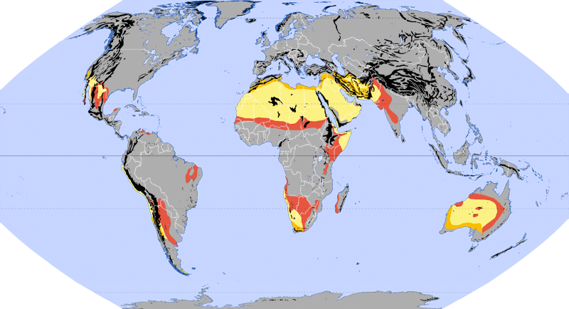 Auszug der Karte Ökozonen nach Jürgen Schultz